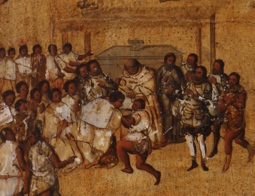 Fragmento de la tabla IV de la Conquista de México, realizada por el pintor novohispano Miguel González. Se representa al bautizo de las ocho mujeres ofrecidas por el gobernante de Cempoala, Xicomecóatl (también conocido como Chicomácatl o "Cacique Gordo").